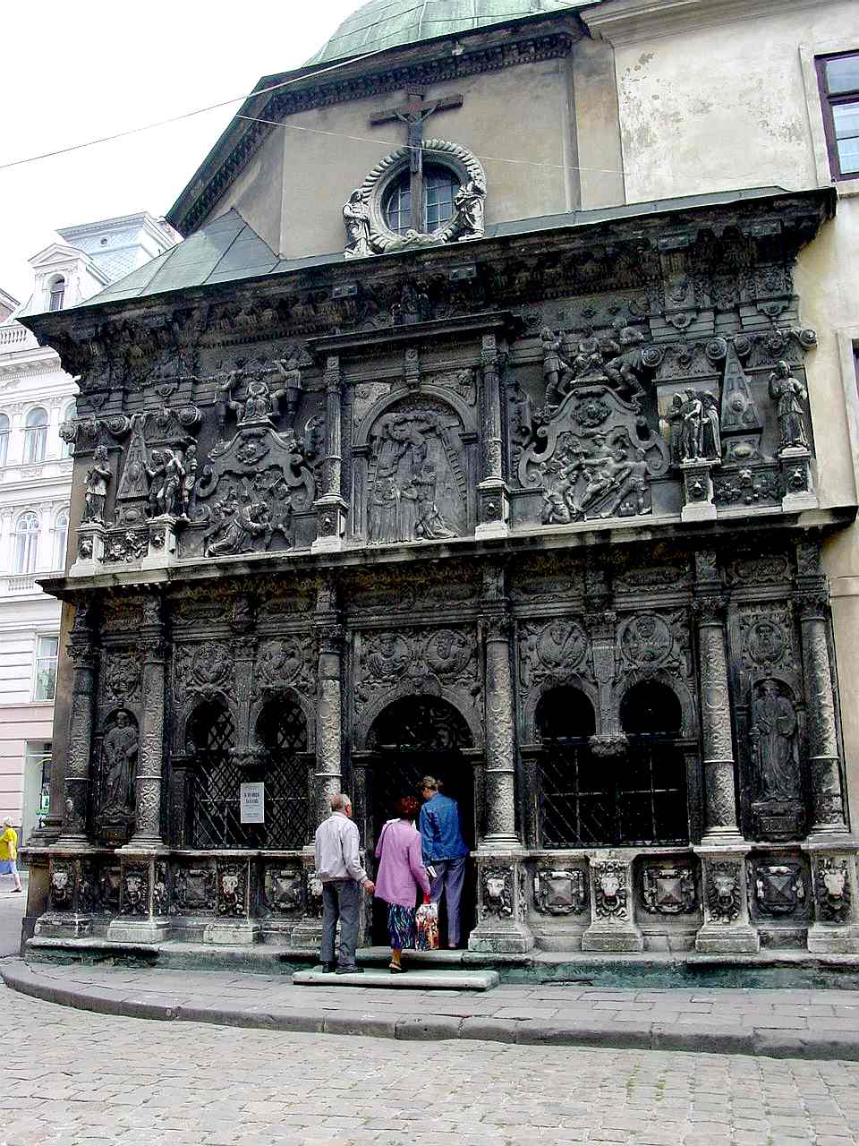 Lwów-Boim Chapel, 2002